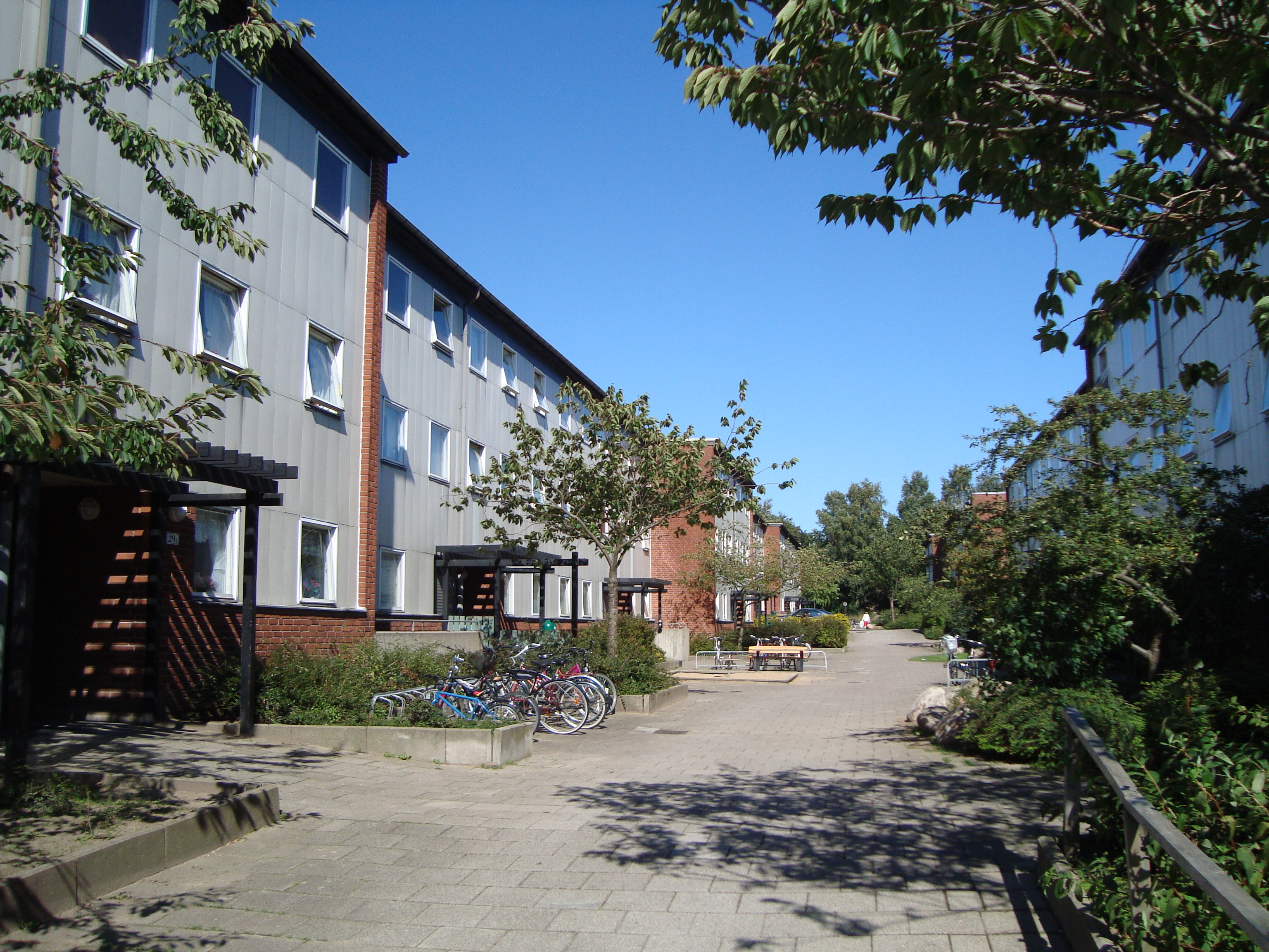 Bostadshus i Drottninghög i Helsingborg.